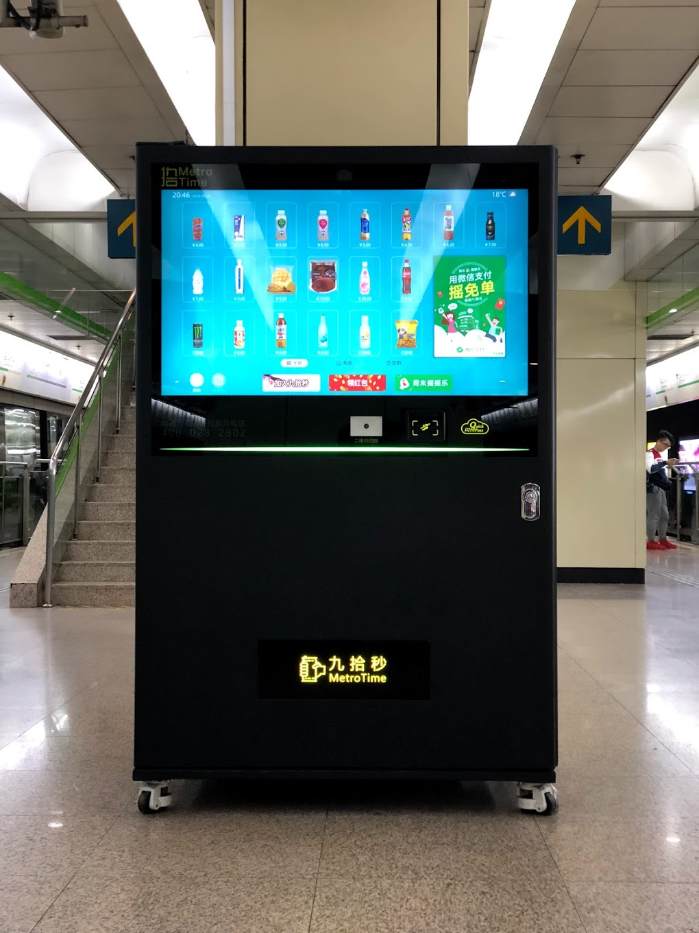 上海轨道交通娄山关路站站台层的自动售货机。